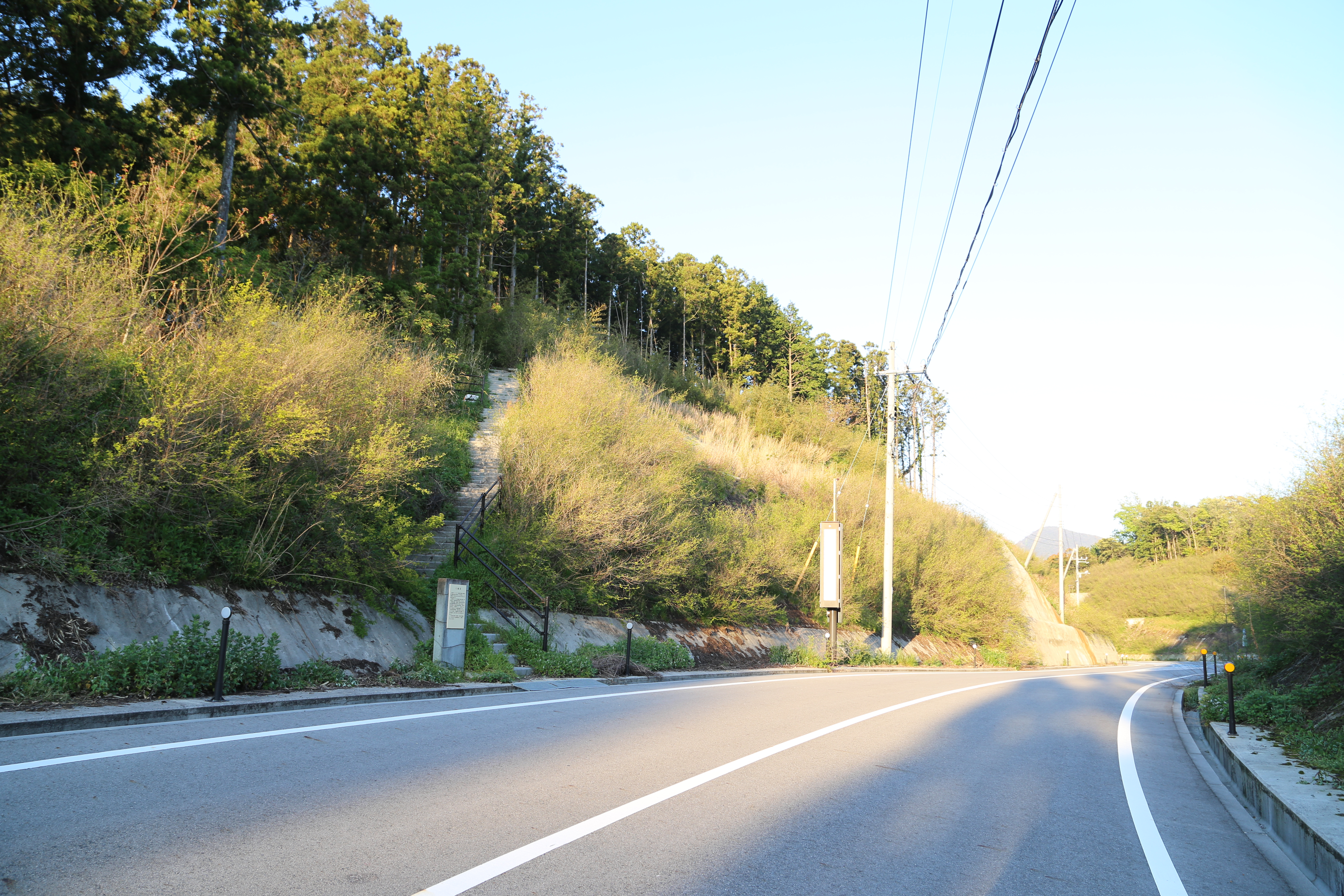 七騎坂（島根県大田市温泉津町小浜） Canon EOS 6D